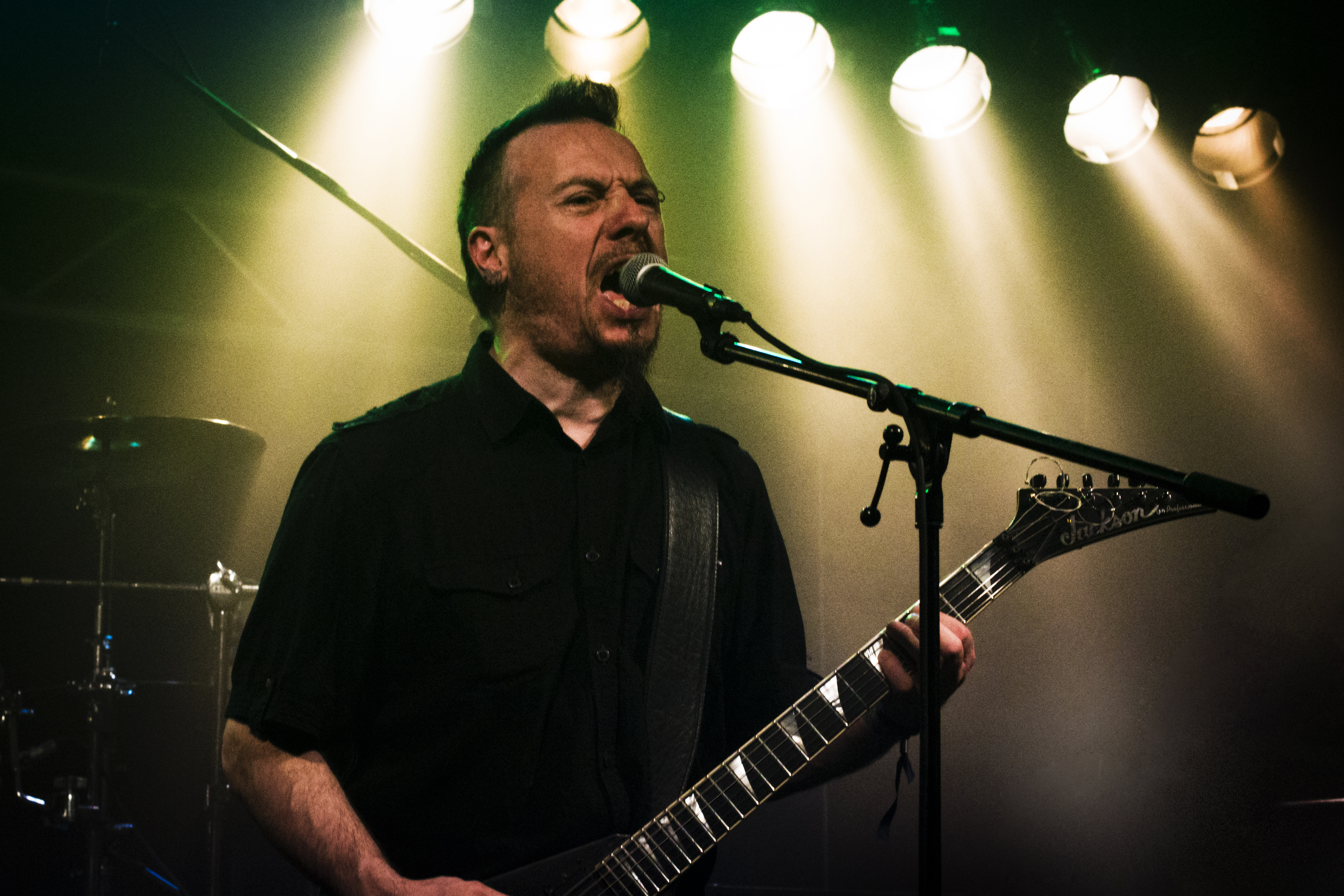 Ian Arkley chanteur guitariste de Seventh Angel au Blast of Eternity 2012.